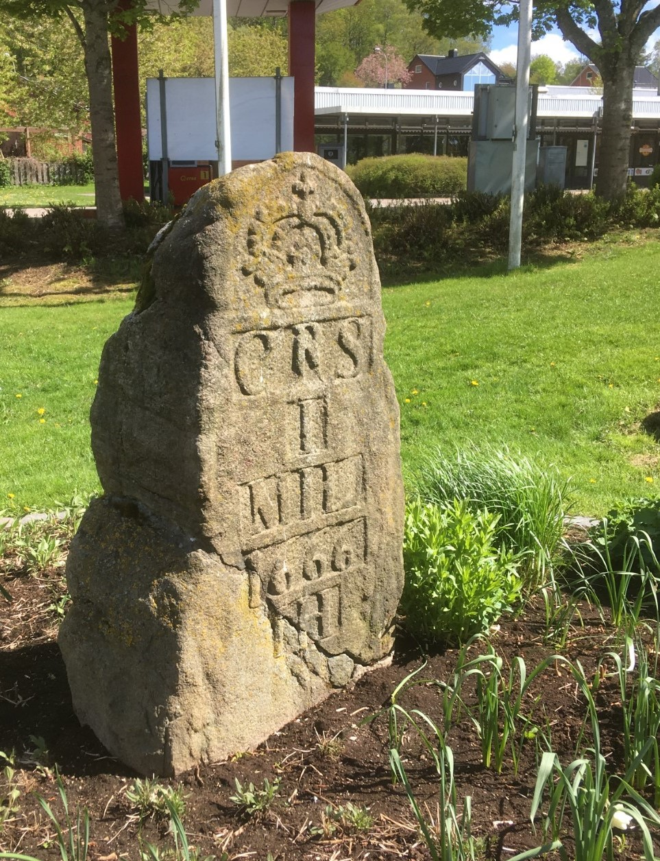 Centralt i Kvibille står denna milsten från 1666. ..